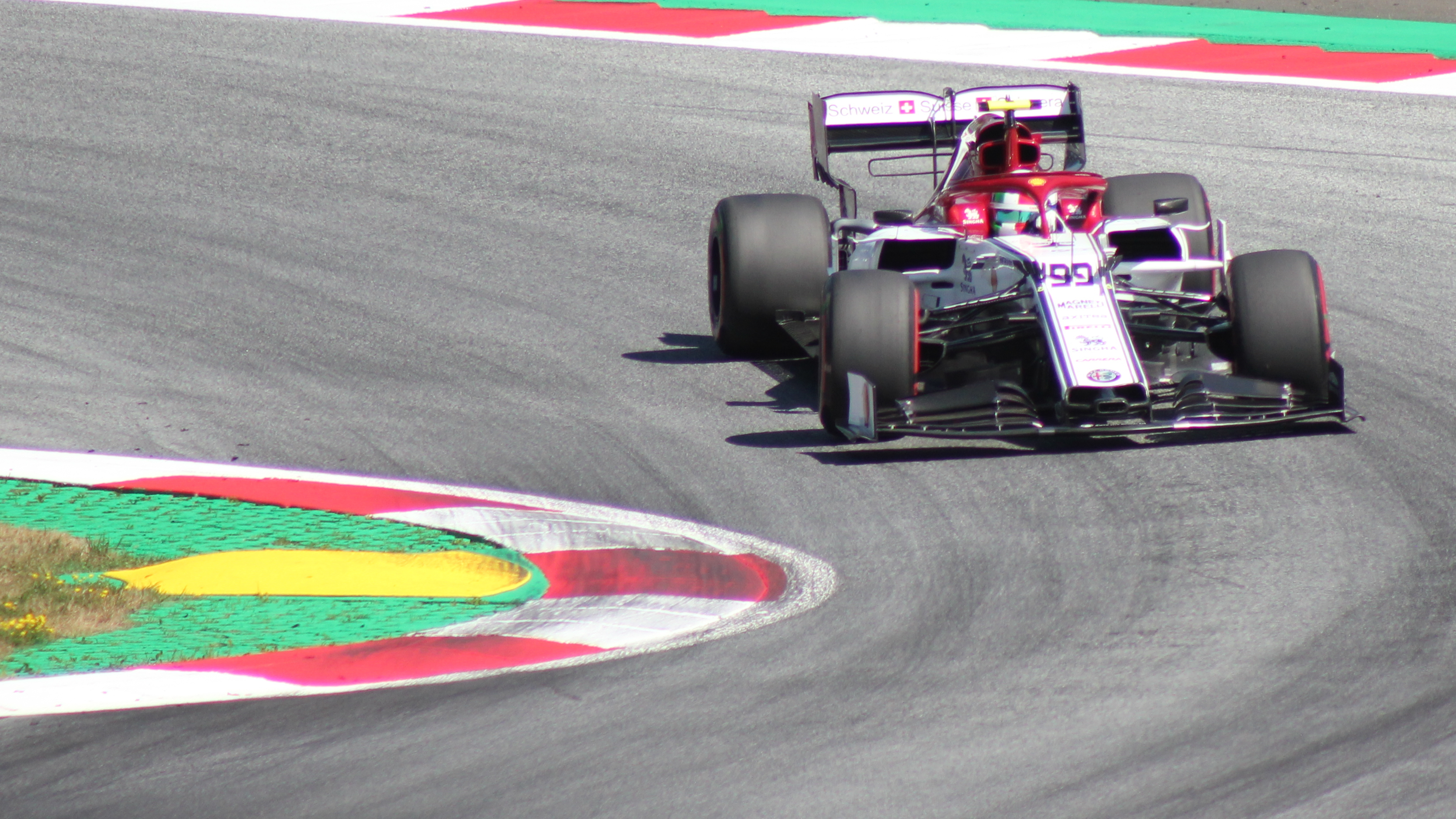 Giovinazzi beim Rennwochenende in Österreich 2019